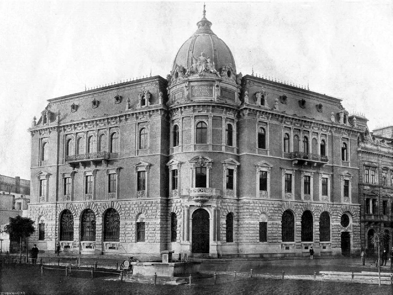 Галицька ощадна каса. Архітектор Юліан Захаревич.